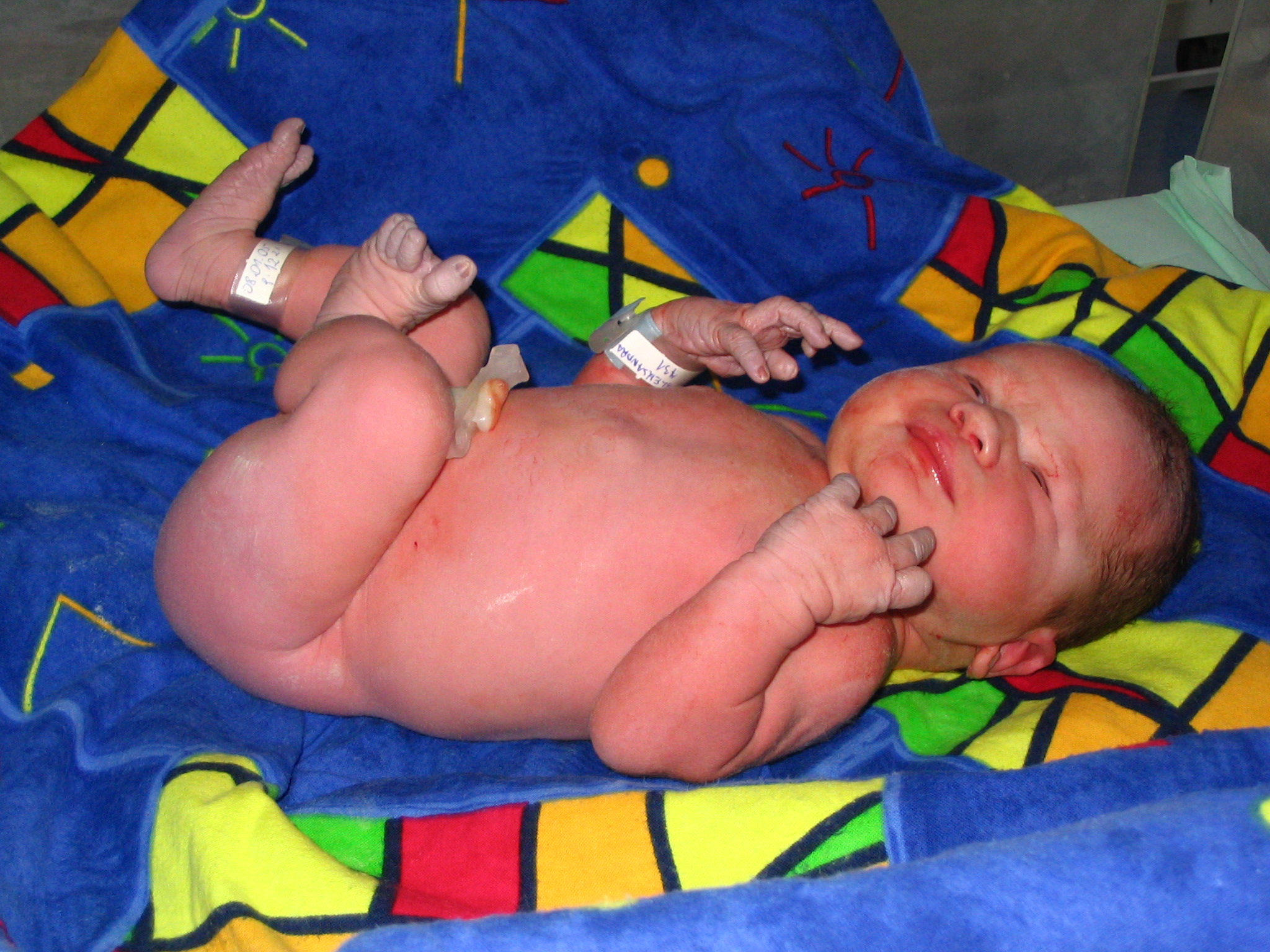 Noworodek w 1 godz. po urodzeniu Autor Wojciech Pospiech